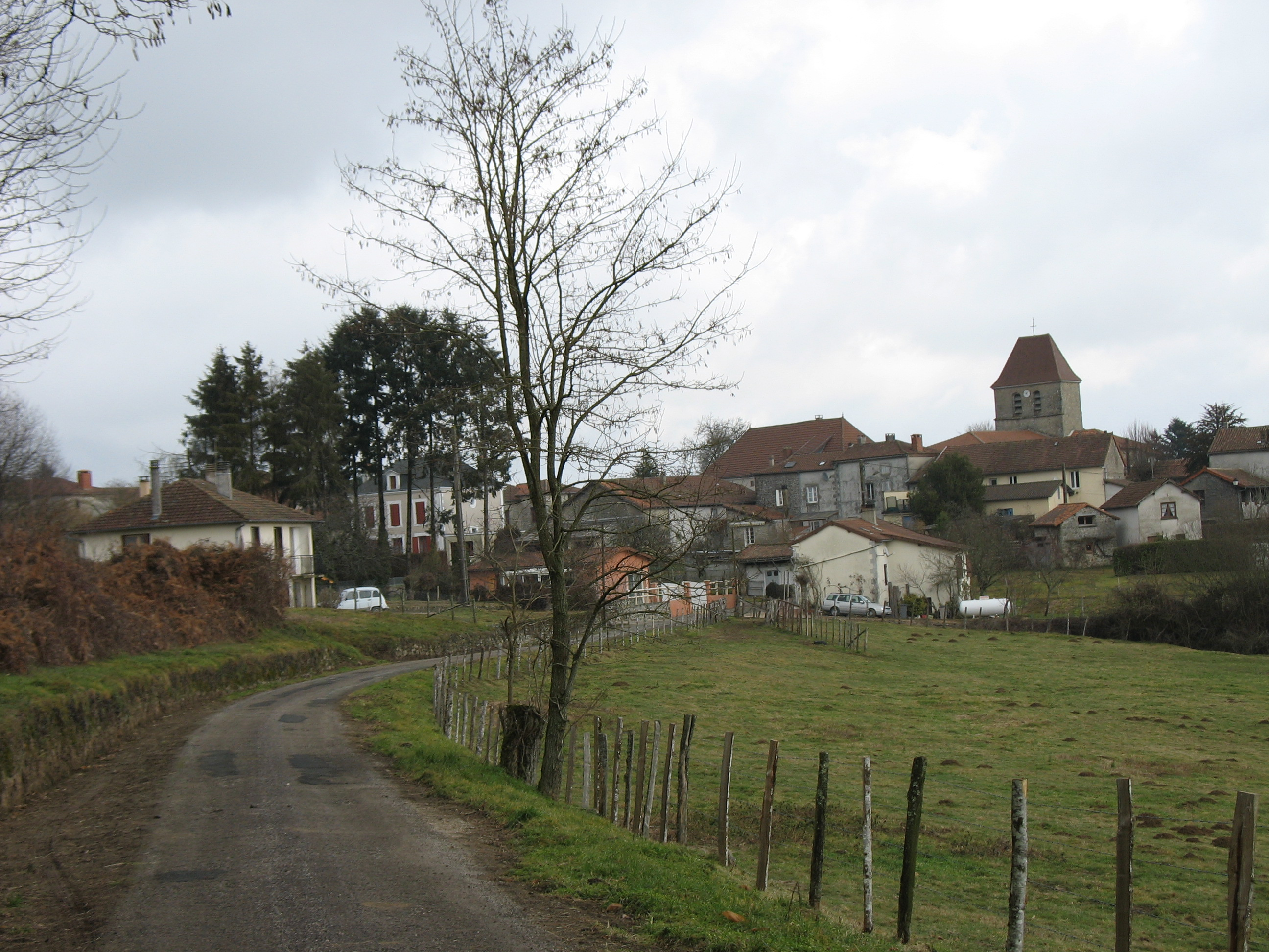 Le village de Saint Saud Lacoussière depuis l'aval.